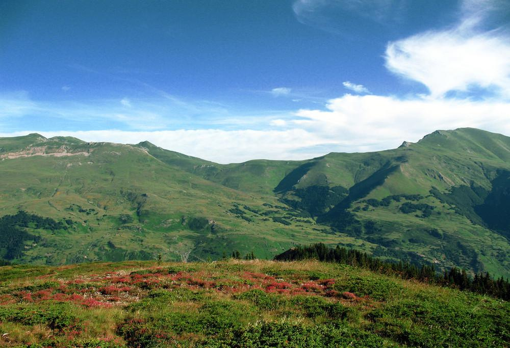 Шар Планина